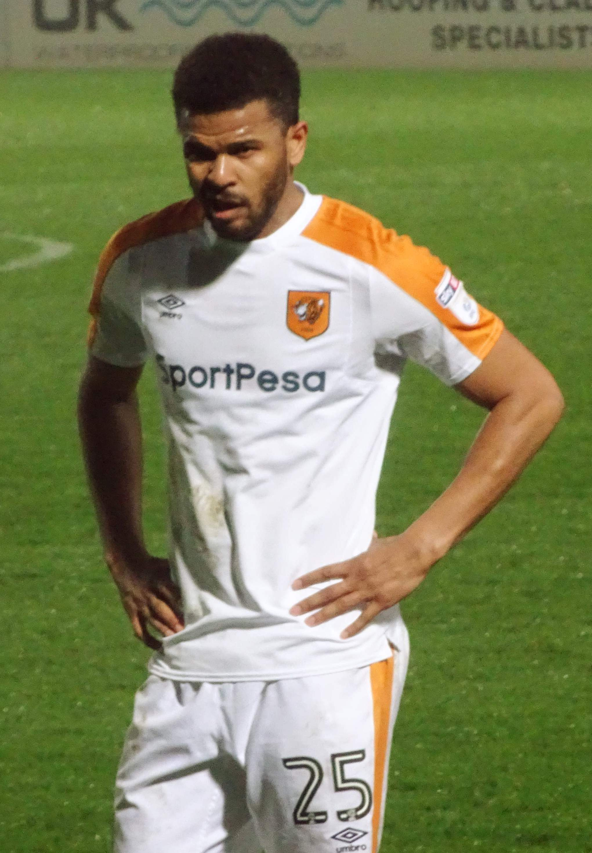 Fazier Campbell